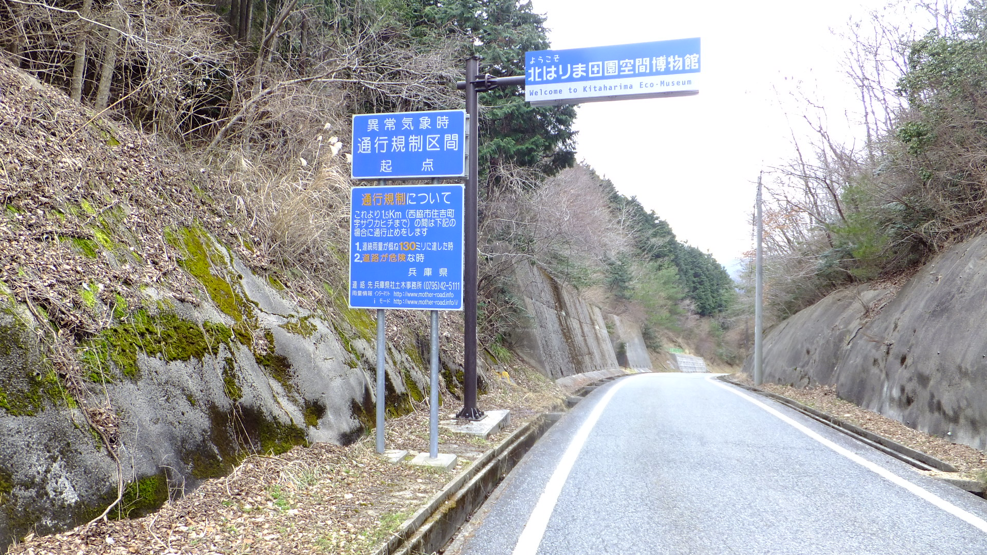 兵庫県西脇市住吉町 兵庫県道36号西脇三田線